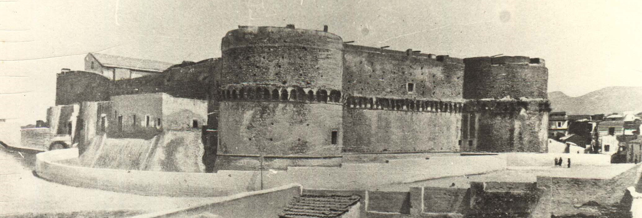 old postcard of Reggio Calabria